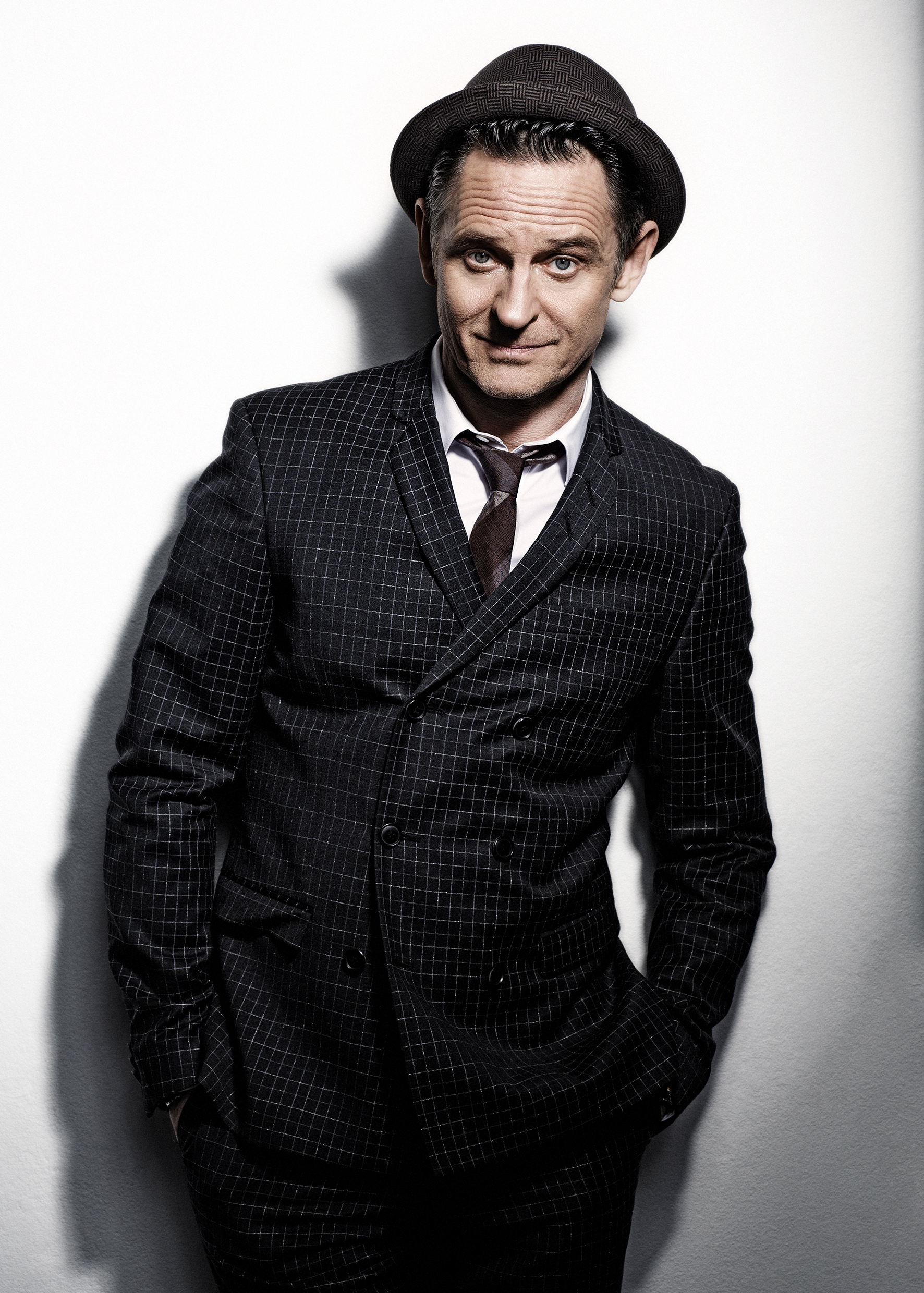 Artisten Thomas "Orup" Eriksson.